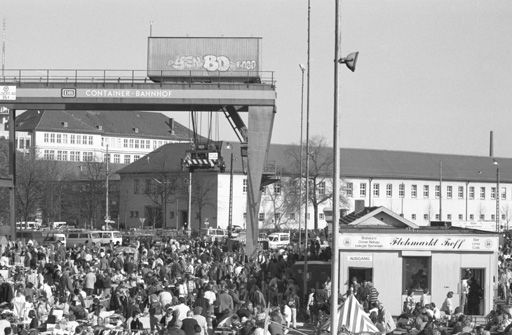 Flohmarkt auf dem Gelände des ehemaligen Containerbahnhofs München an der Arnulfstrasse nahe der Hackerbrücke, dem heutigen Arnulfpark am 17. August 1996. Fotografie aus einer Serie über Flohmärkte in München. Veröffentlicht in: Münchner Stadtmagazin Heft 04/1997, Seite 18–20: Schräge Paradiese